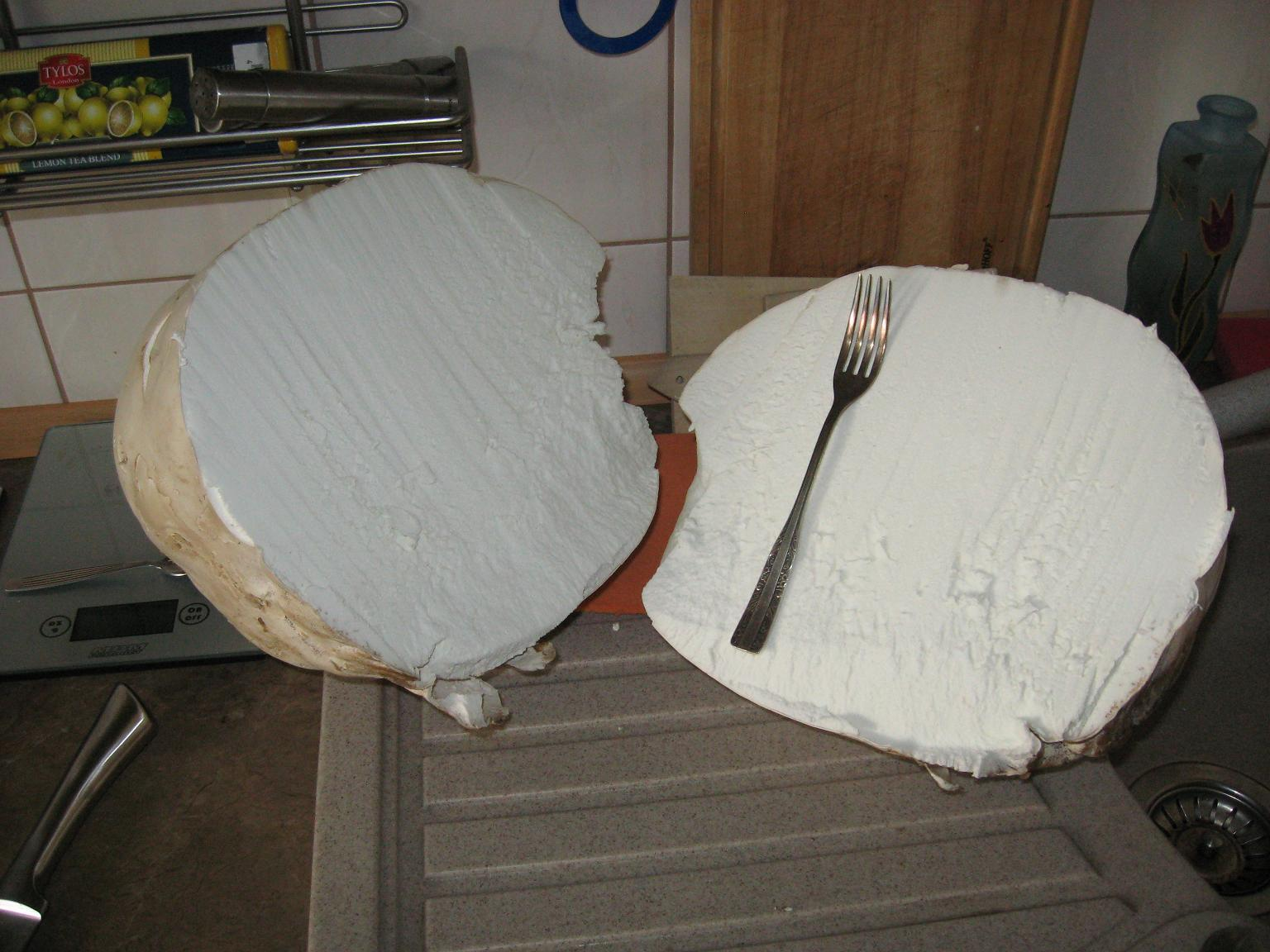 Widok rozciętej Purchawki olbrzymiej. Widelec do skali.